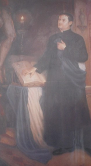 participó como uno de los principales líderes del fallido movimiento independentista del año 1811